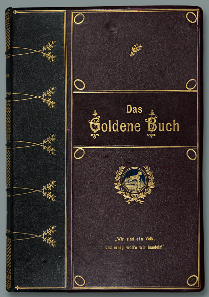 Braunschweig, Heinrich der Löwe in Eisen: Einbanddeckel des „Goldenen Buches“. Es enthält die Namen aller Personen und Institutionen (inkl. des gespendeten Betrages), die Nägel in die Figur eingeschlagen haben. Auf dem Deckel zu sehen ist der Braunschweiger Löwe und der Spruch "Wir sind ein Volk und einig woll’n wir handeln!" (aus Friedrich Schillers Wilhelm Tell)